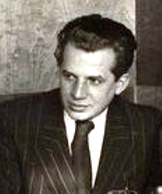 Vaszary Gábor (1897 – 1985) író, újságíró, Vaszary János színész, író és Vaszary Piri színésznő bátyja.